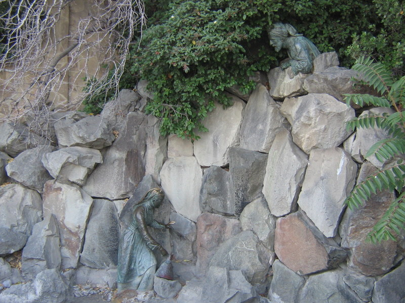 Скульптура «Дівчина Арзи та розбійник Алі-Баба» в Місхорі